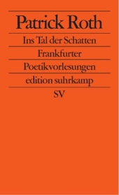 Poetikv